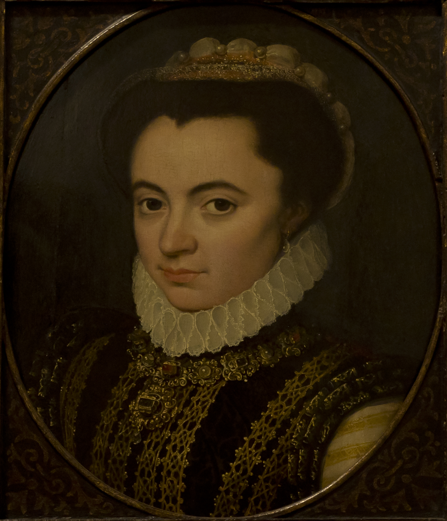 langlabel QS:Lde,"Isabel von Portugal" label QS:Len,"Isabel of Portugal" label QS:Lnl,"Isabella van Portugal"